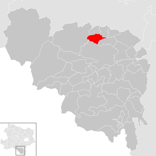 Bezirk Neunkirchen